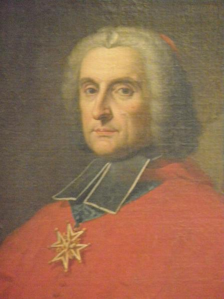 Pierre-Paul Guérin Cardinal De Tencin (1679-1758), archevêque de Lyon